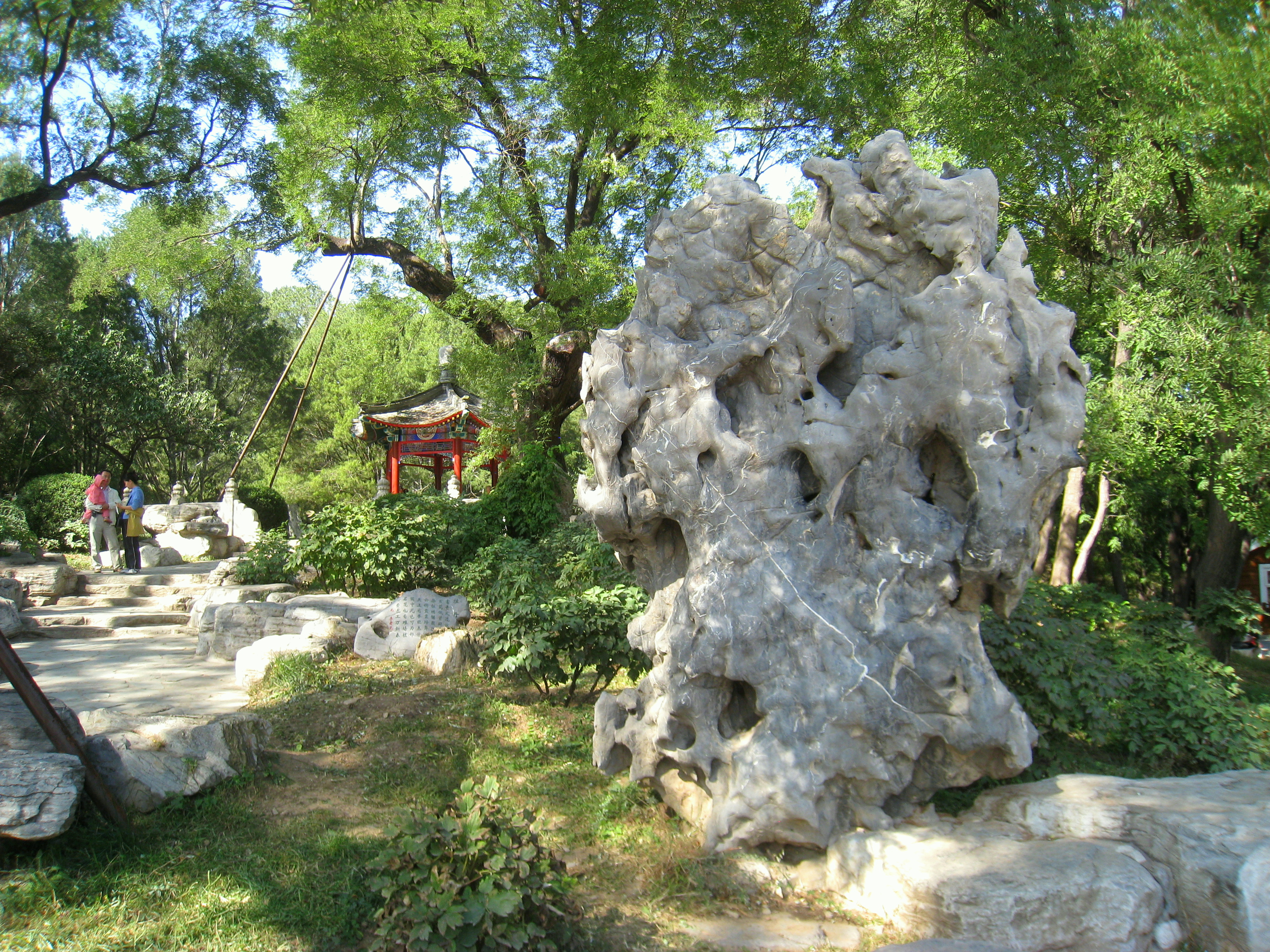 Beijing Botanical Garden (北京植物园), Beijing, China.